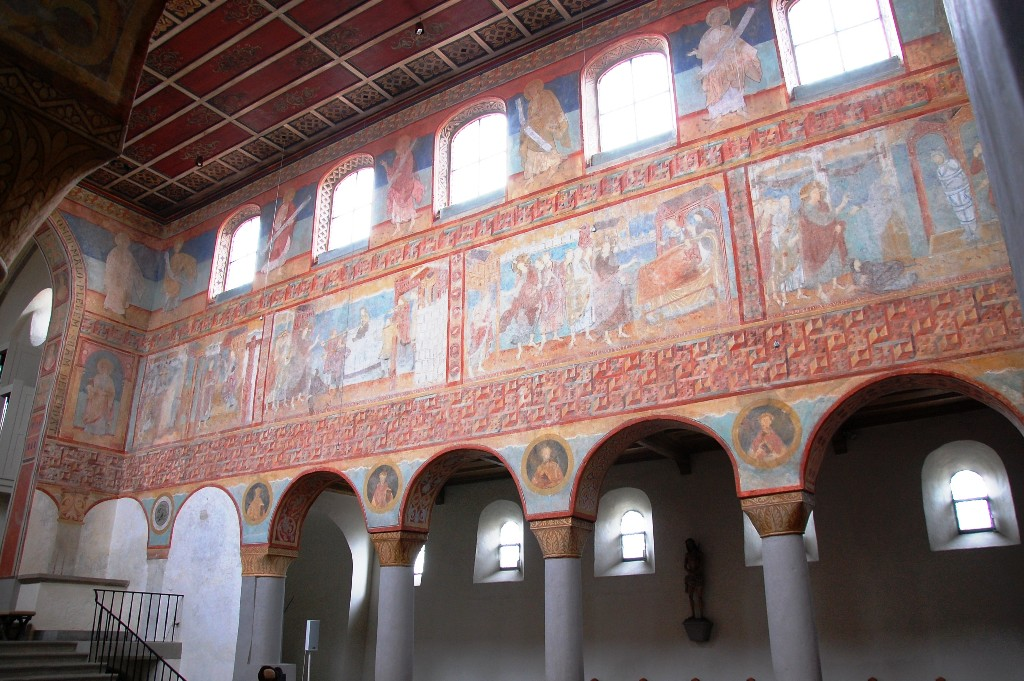 Wandmalerei im Innenraum der Klosterkirche St. Georg